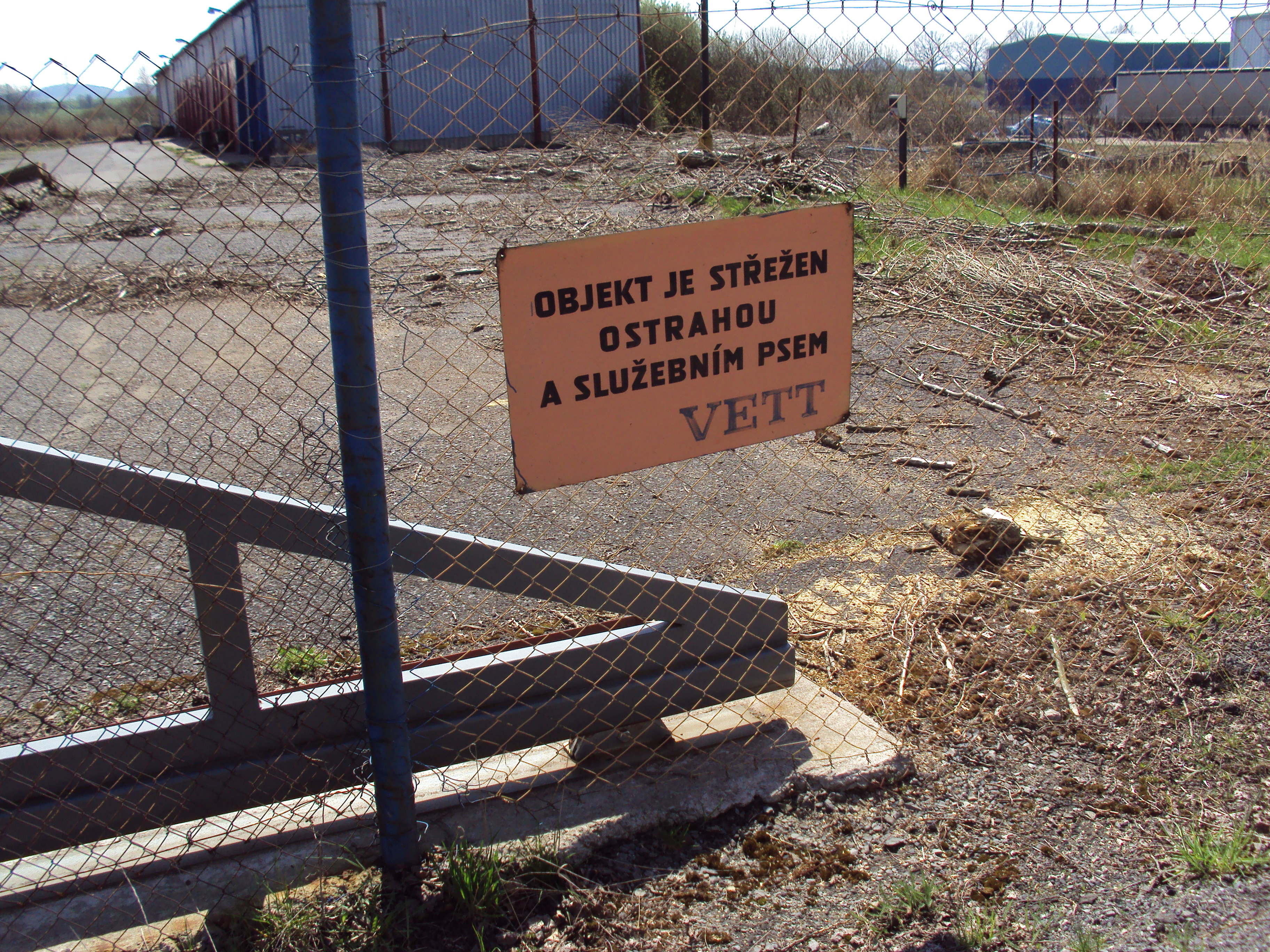 Plot prázdného areálu firmy Vett v Zákupech